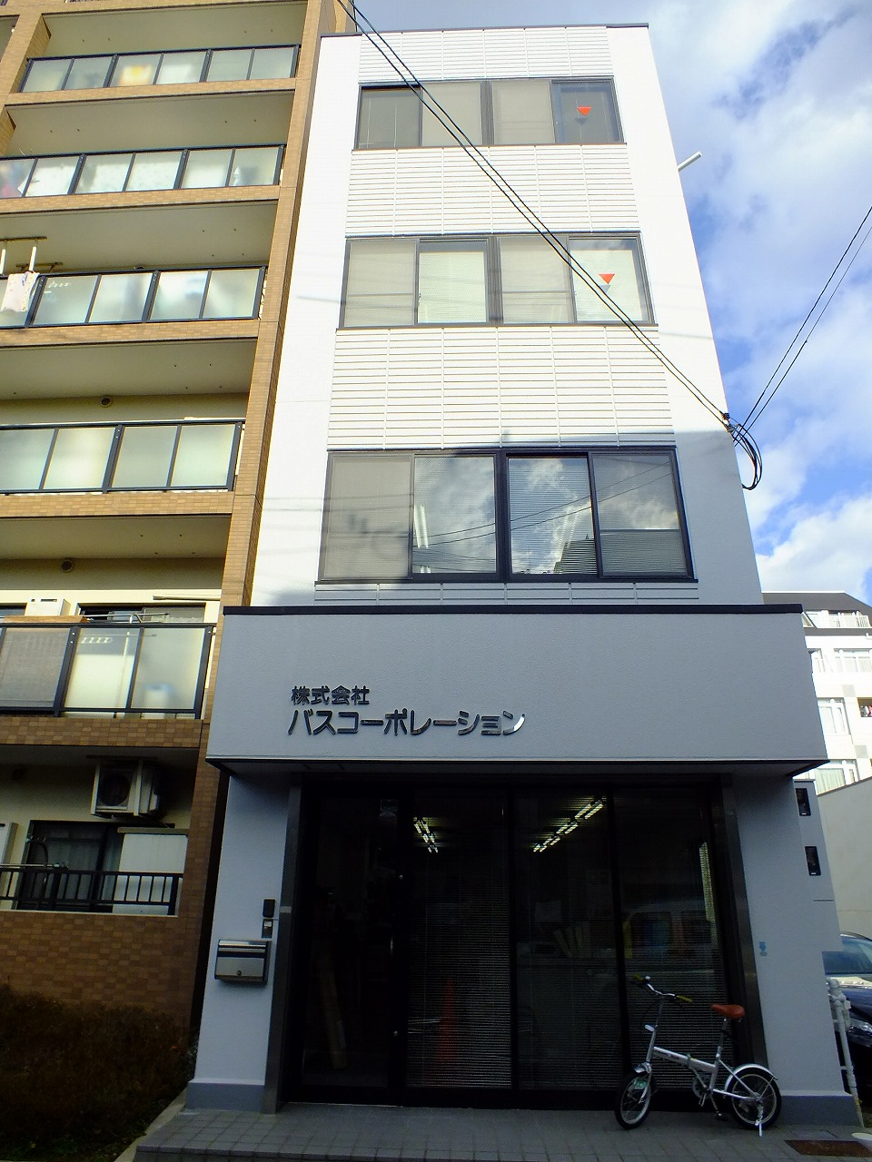 BATH CORPORATION Company, Limited バス・コーポレーション